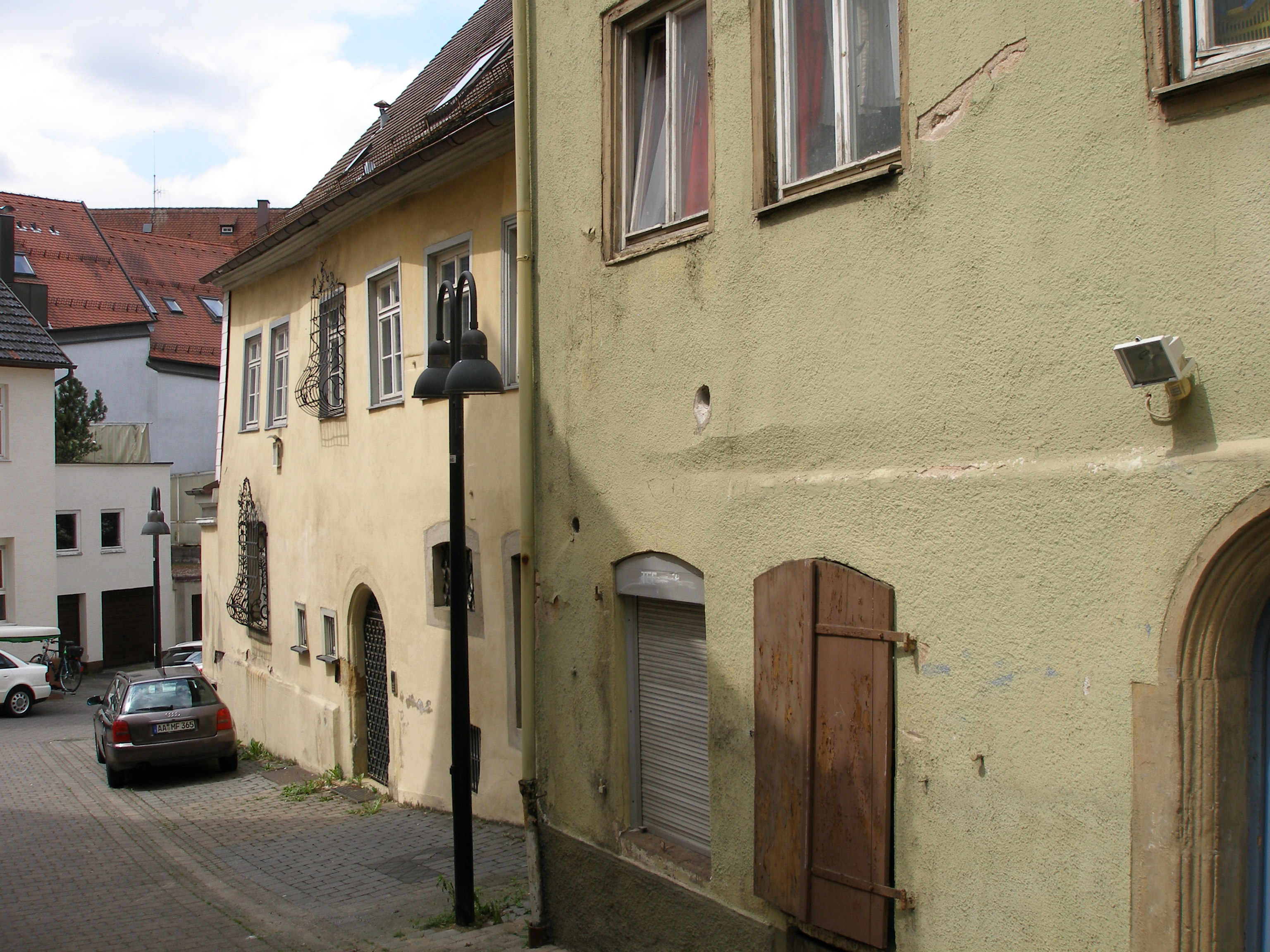 Schwäbisch Gmünd OLYMPUS DIGITAL CAMERA